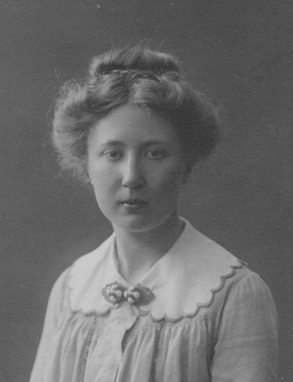 Karin Ek (1885-1926)